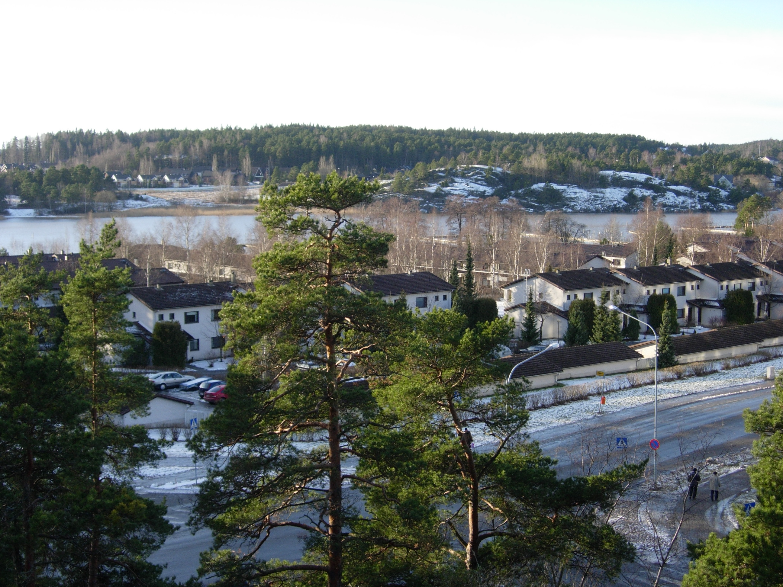 Edessä Uittamon Naularanta, sitten Pitkäsalmi ja takana Moikoinen, Vräkinkatu.